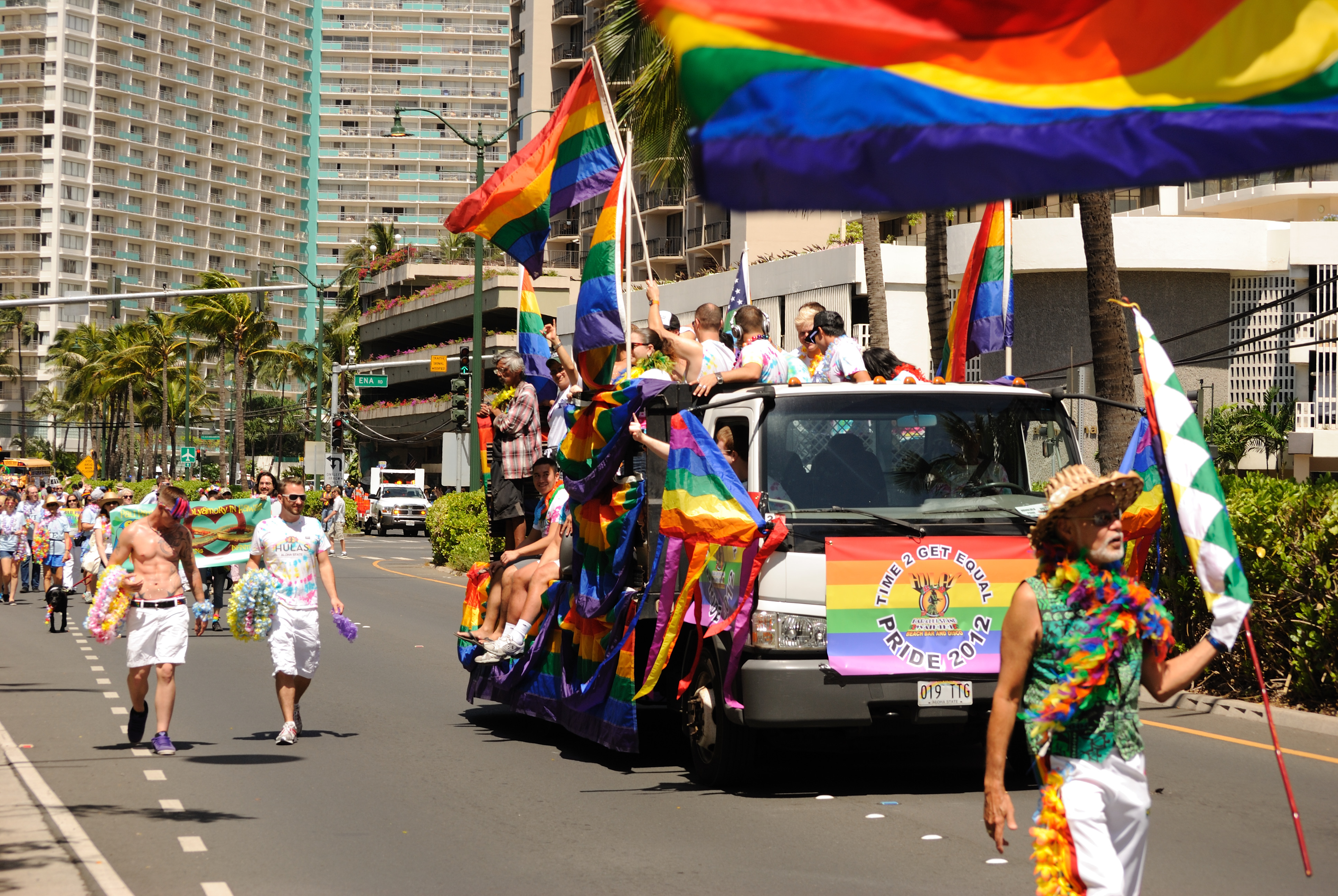 Honolulu Pride Parade - 2012